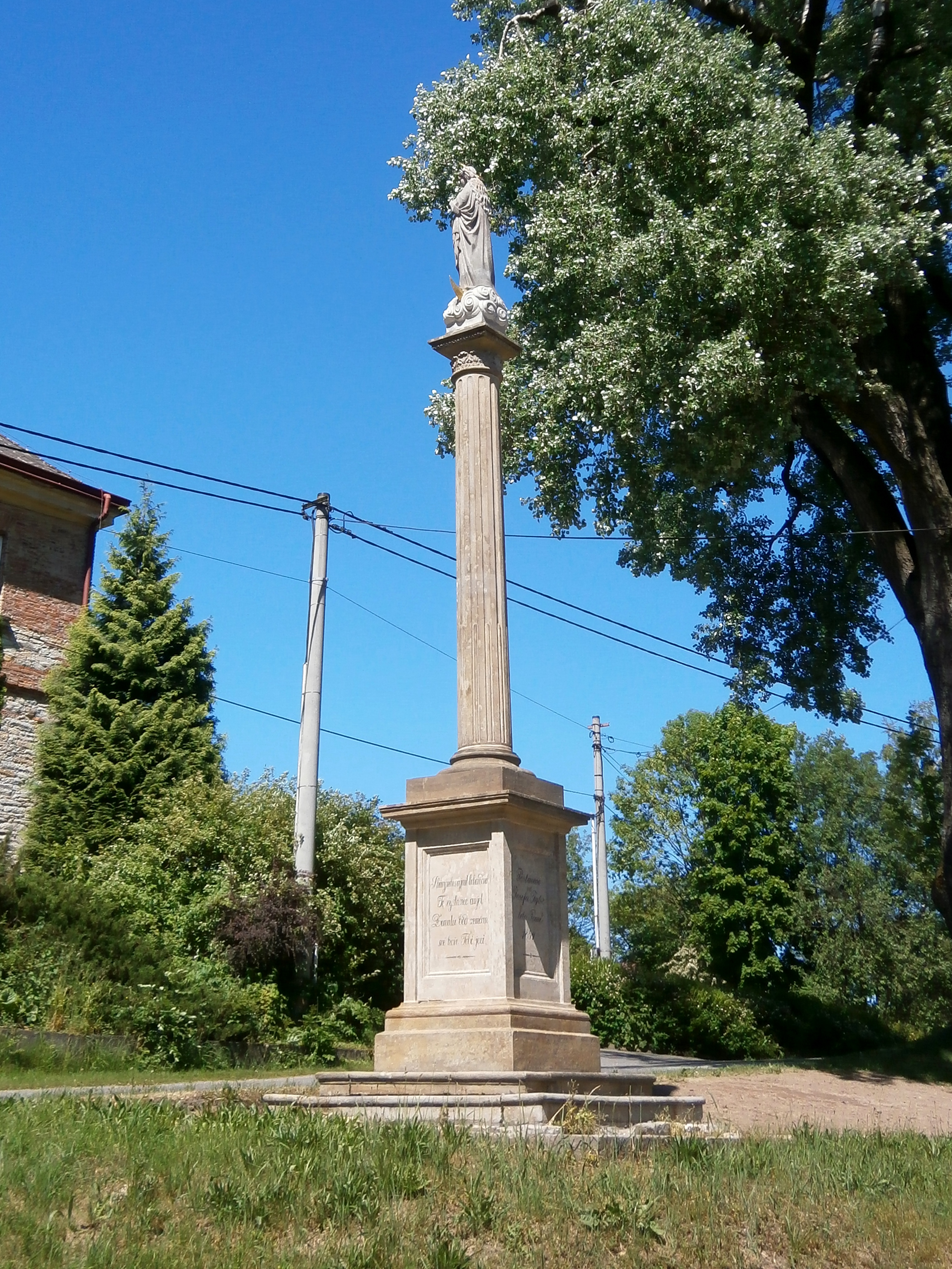 Socha Panny Marie v Mezilečí